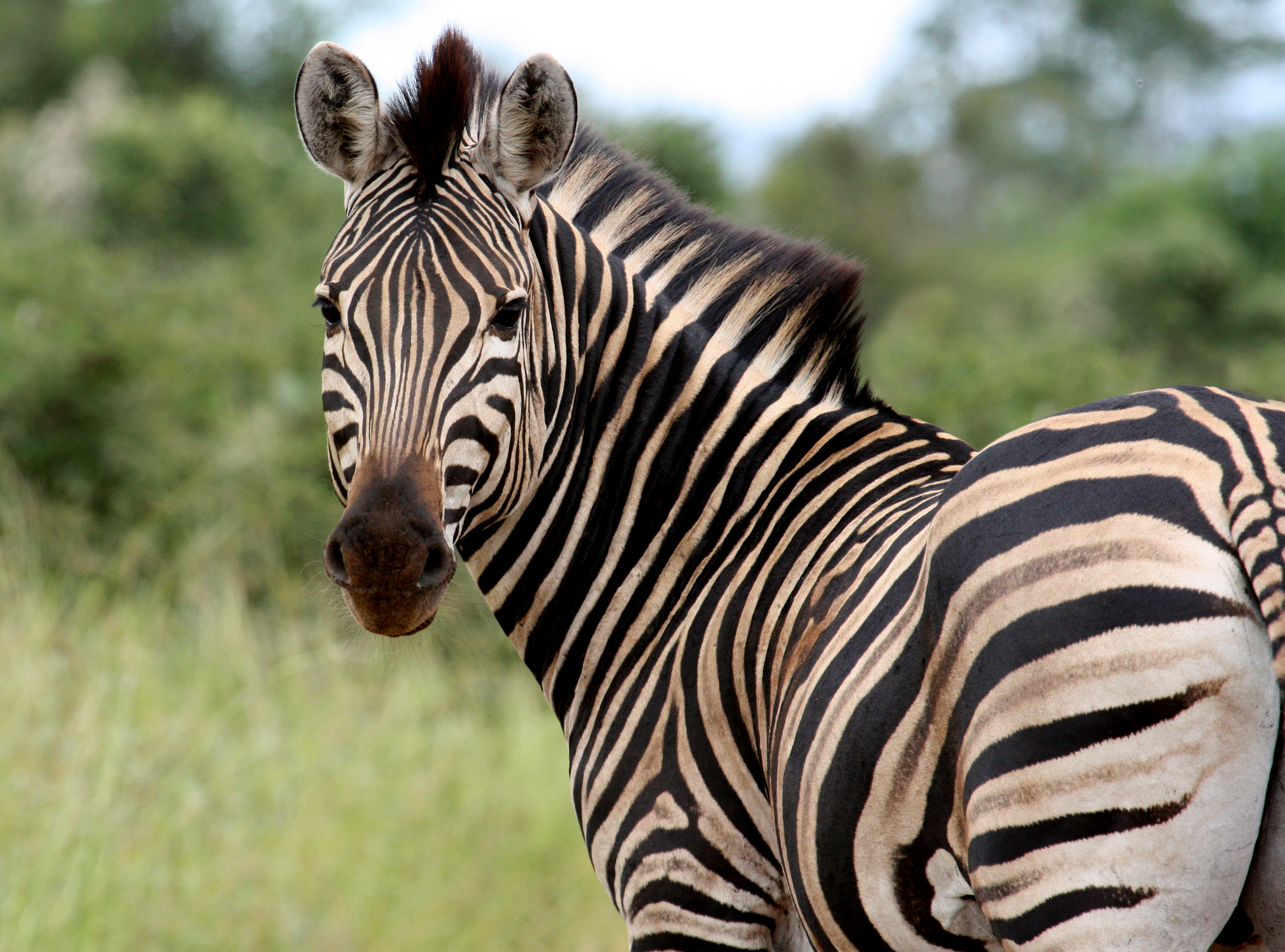 Zebra at Kruger National Park